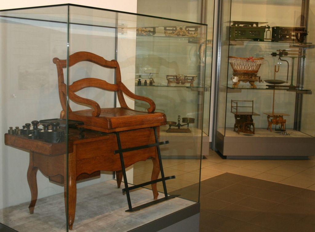 Waagenmuseum Oschatz Personenstuhlwaage